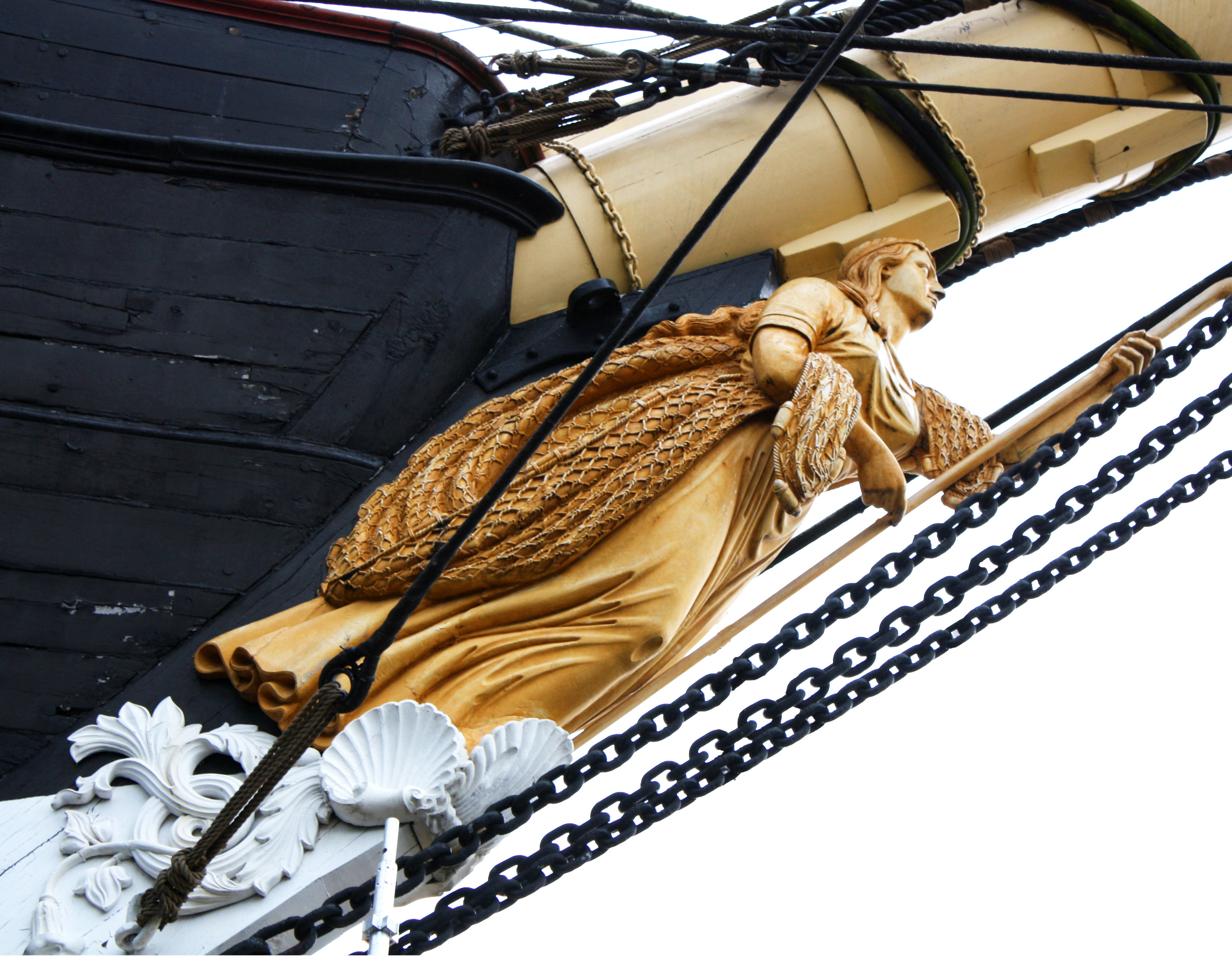 Galionsfigur der Fregatte Jylland, Ebeltoft (DK)Anmerkung: Ein störendes Gerüst im Hintergrund wurde mit einem Bildbearbeitungsprogramm entfernt.